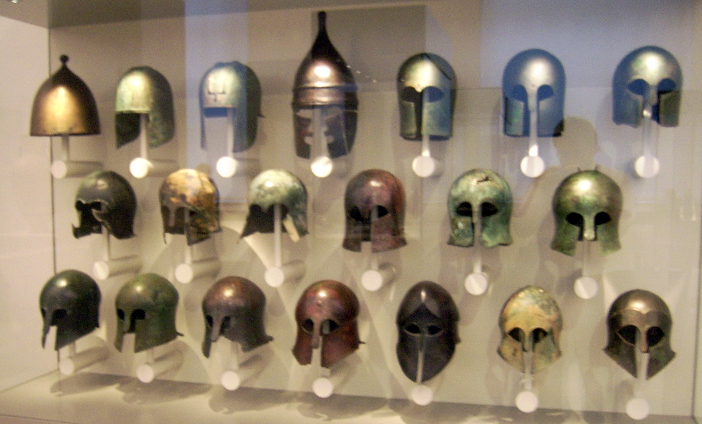 Griechische Helme aus Olympia und aus der Sammlung Lipperheide, Antikensammlung im Alten Museum Berlin